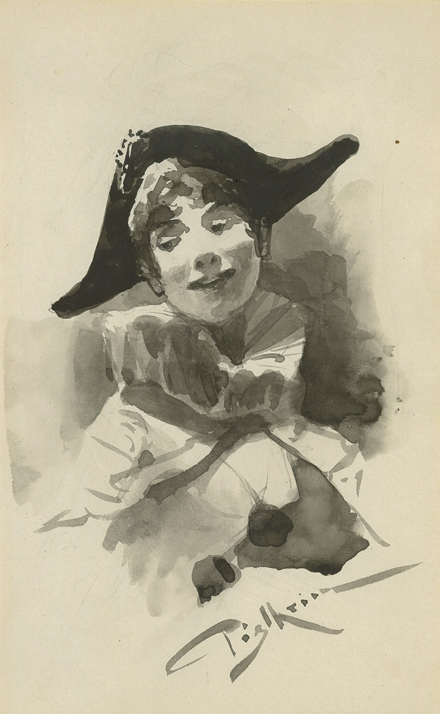 Bruno Piglhein: Pierrot. 1880er Jahre, Tuschpinselzeichnung auf Papier, 22,5 x 14 cm, rechts unten signiert